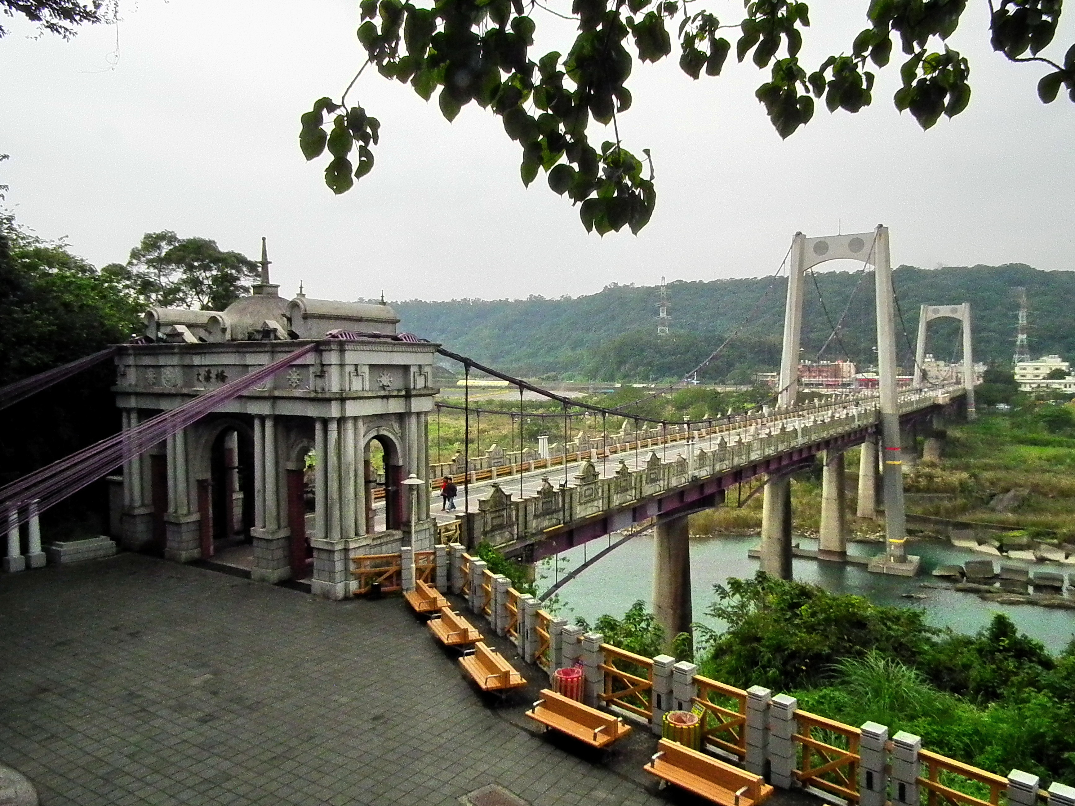 大溪橋 Da Xi Bridge